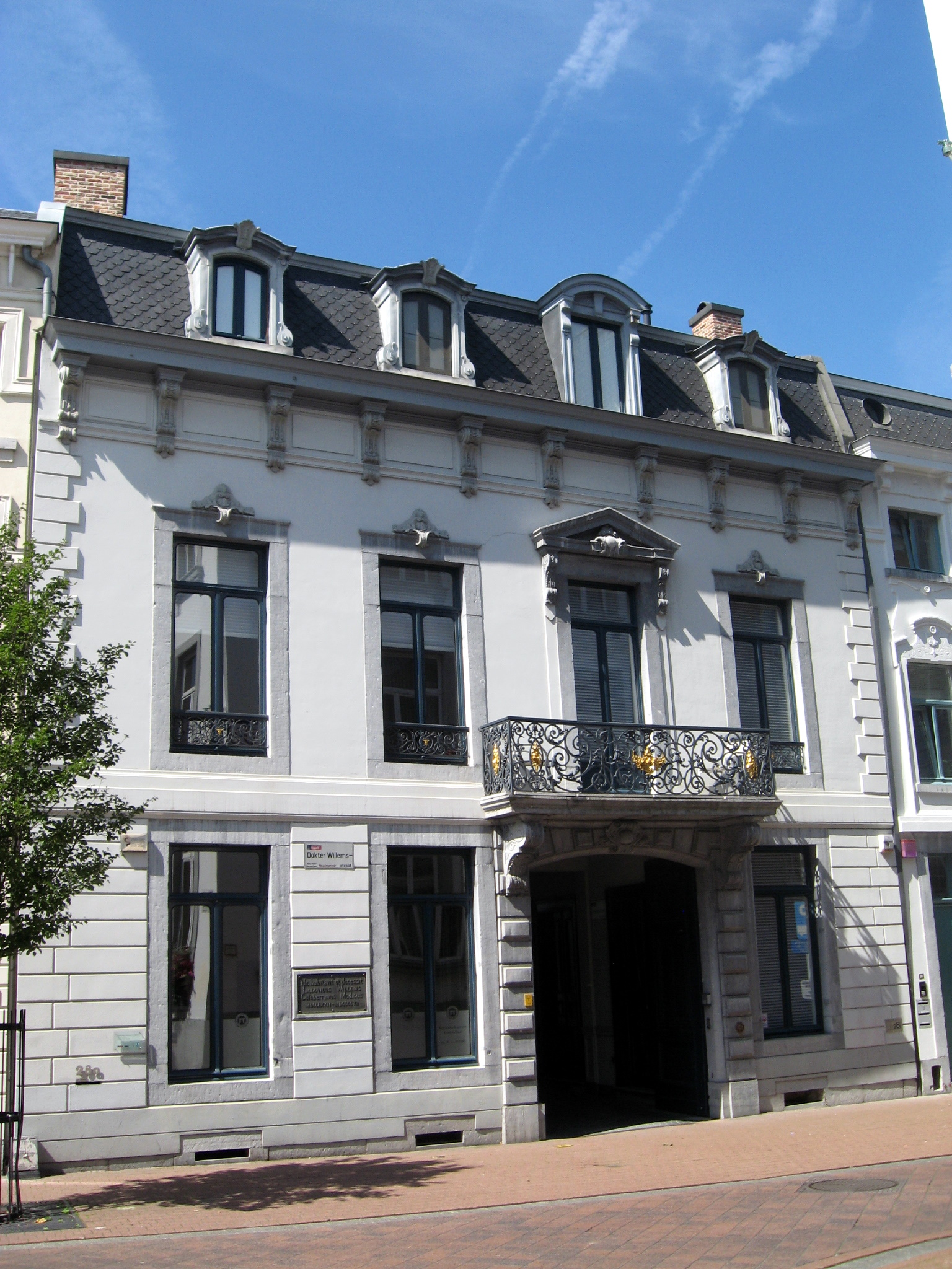 Voormalige woning van dokter Louis Willems